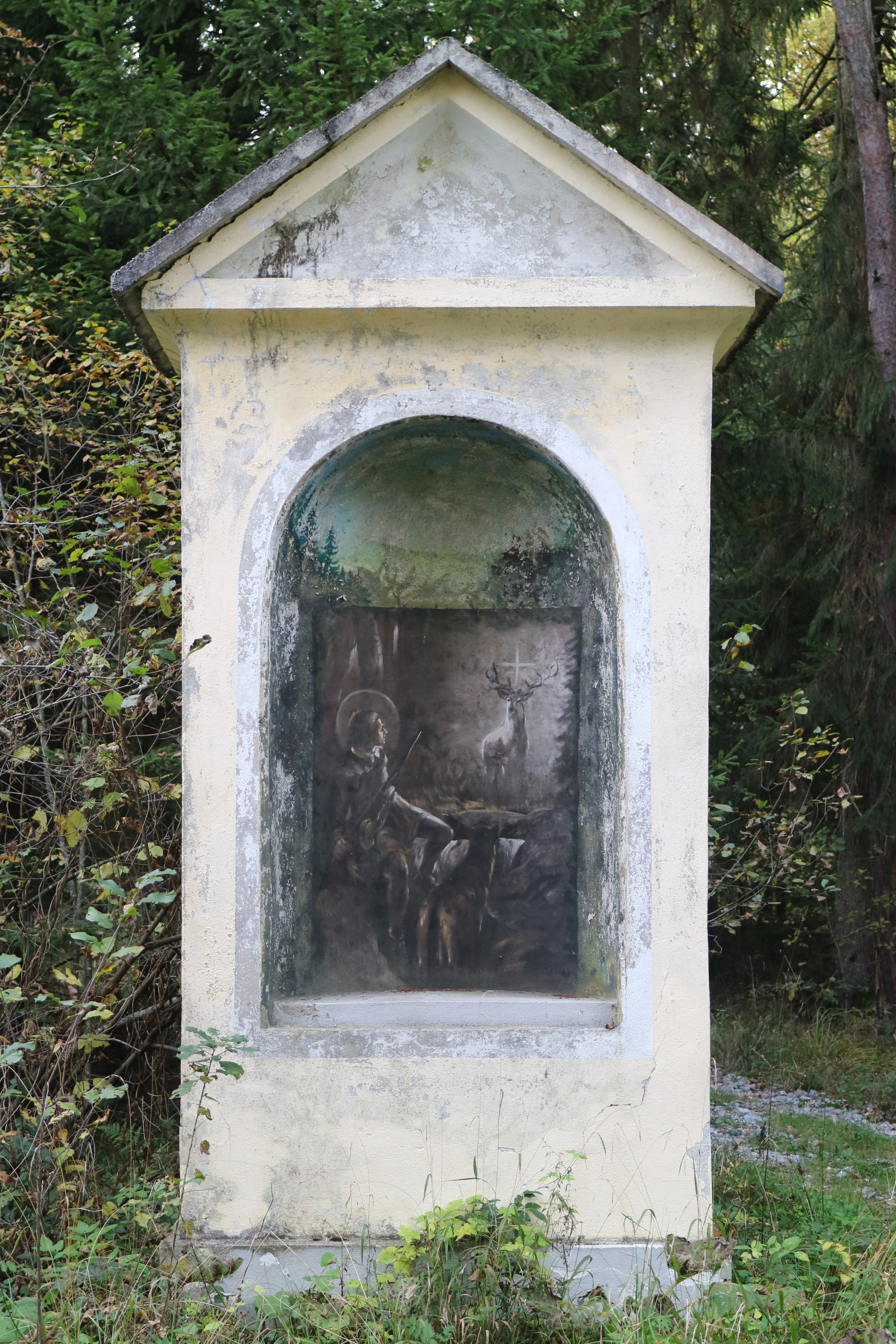 Jägerkreuz im Kaiserwald nahe Tobelbad (Gemeinde Premstätten)